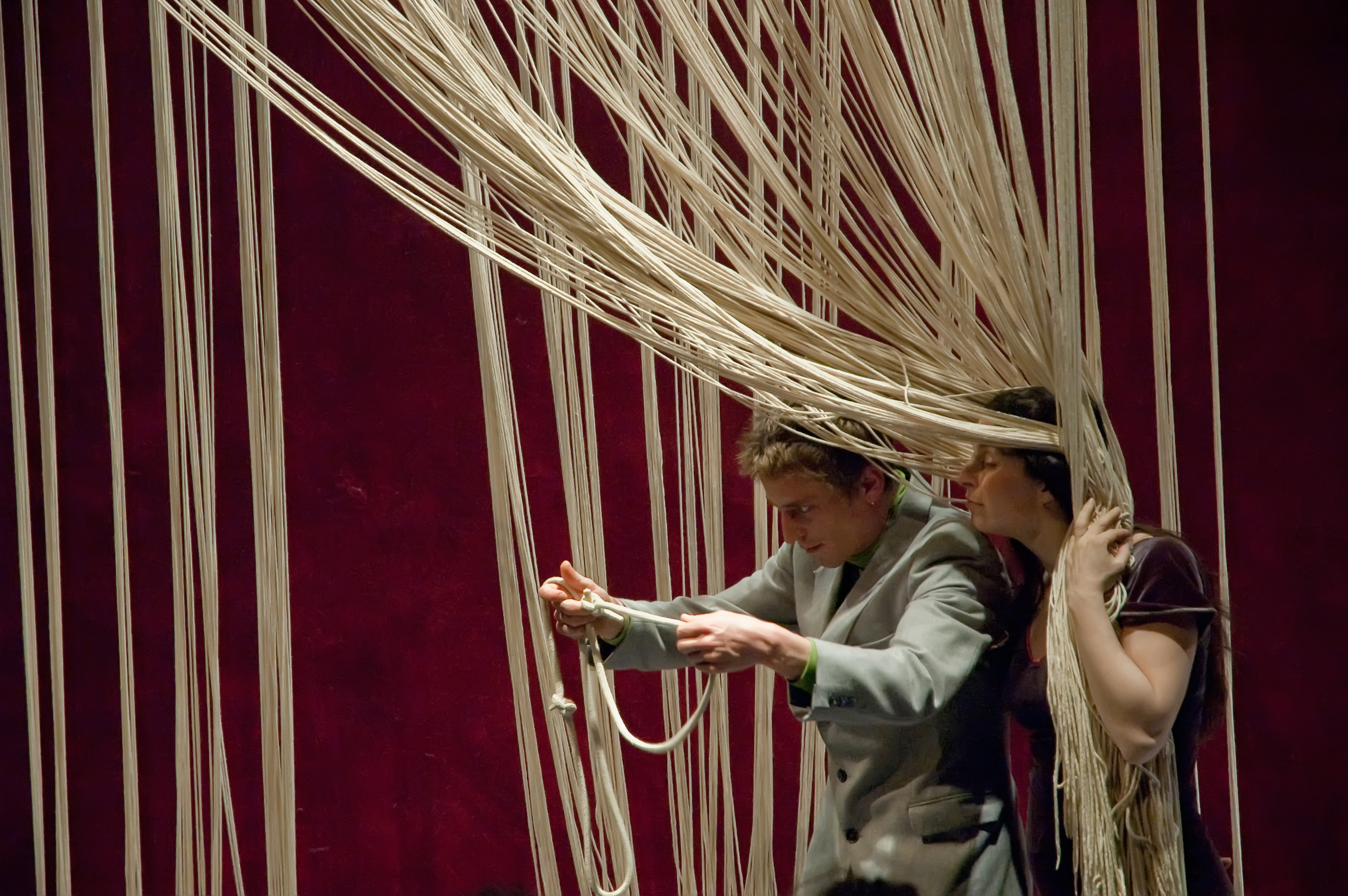 Spectacle Les Fils qui nous lient, Paris